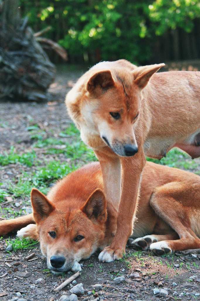 A pair of dingoes.